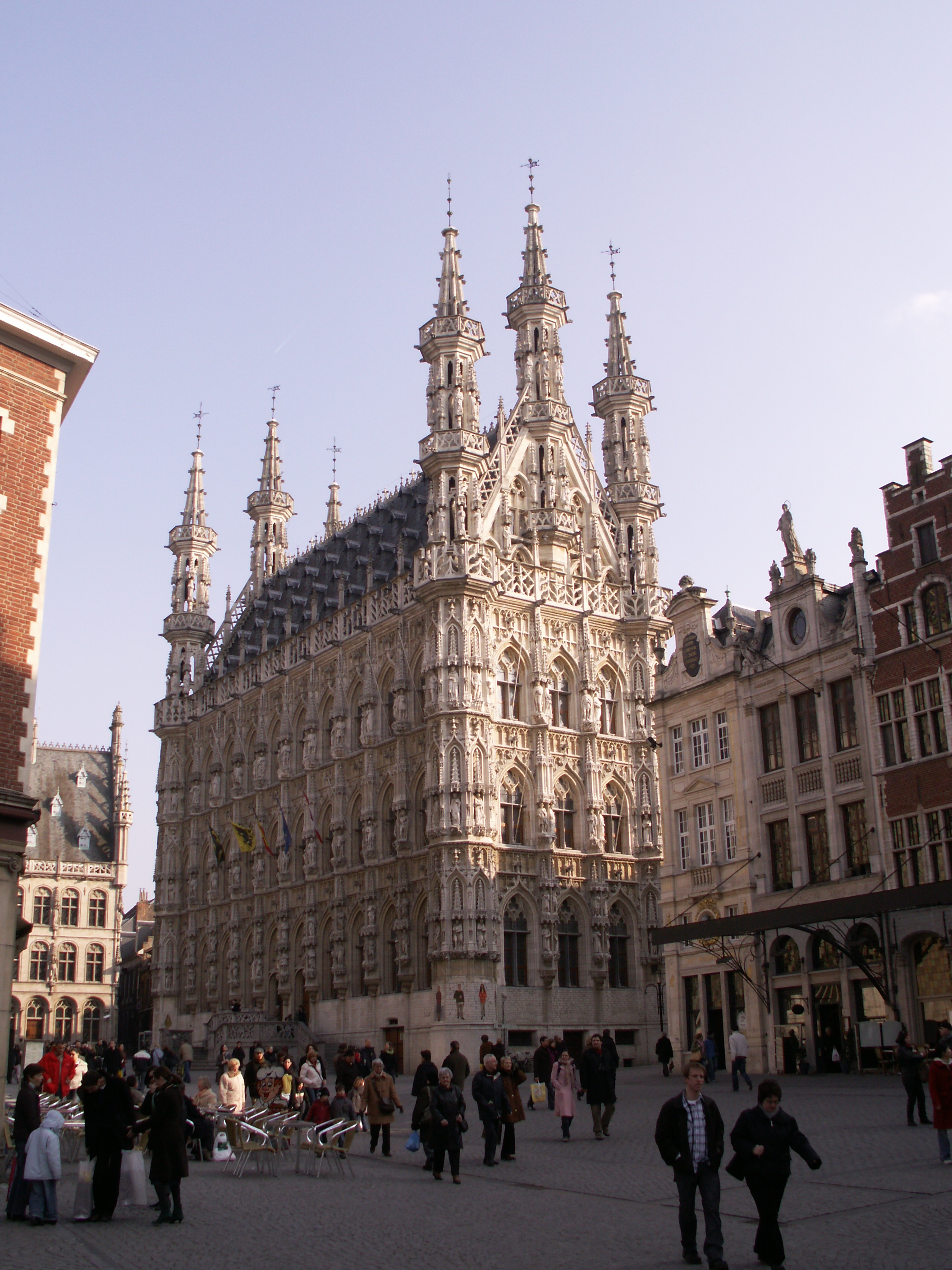 * Hôtel de ville de Louvain (Belgique) Construit entre 1439 et 1469 Gothique flamboyant Cliché personnel (18.03.2006)